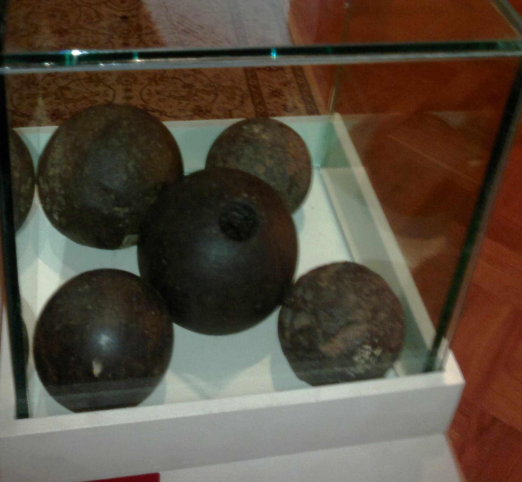 Gəncə qalasının müdafiəçilərinə qarşı tətbiq edilmiş rus top mərmiləri. Bu mərmilər rus komandanlığının göstərişi ilə 1803-1804-cü illərdə Gəncənin qala divarlarının yanından yığılmışdır.